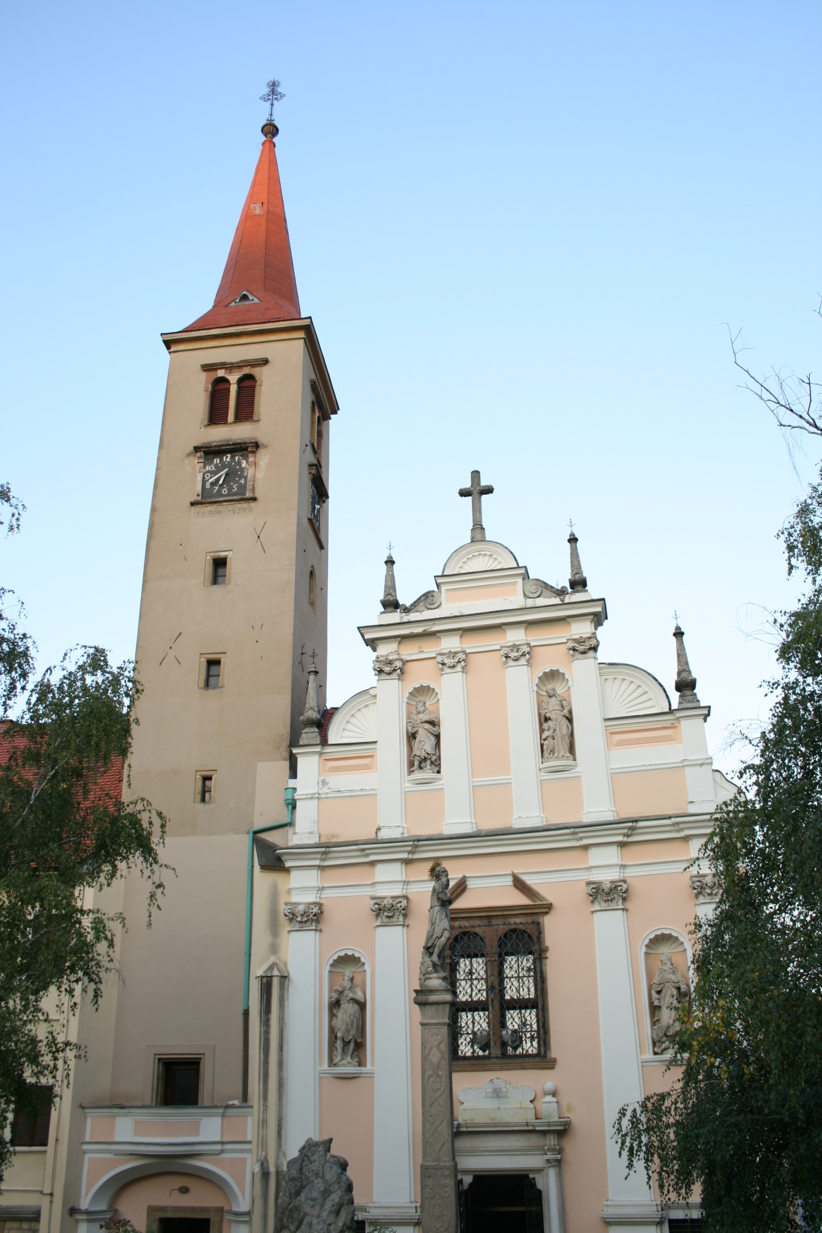 pročelje i toranj crkve Majke Božje Remetske